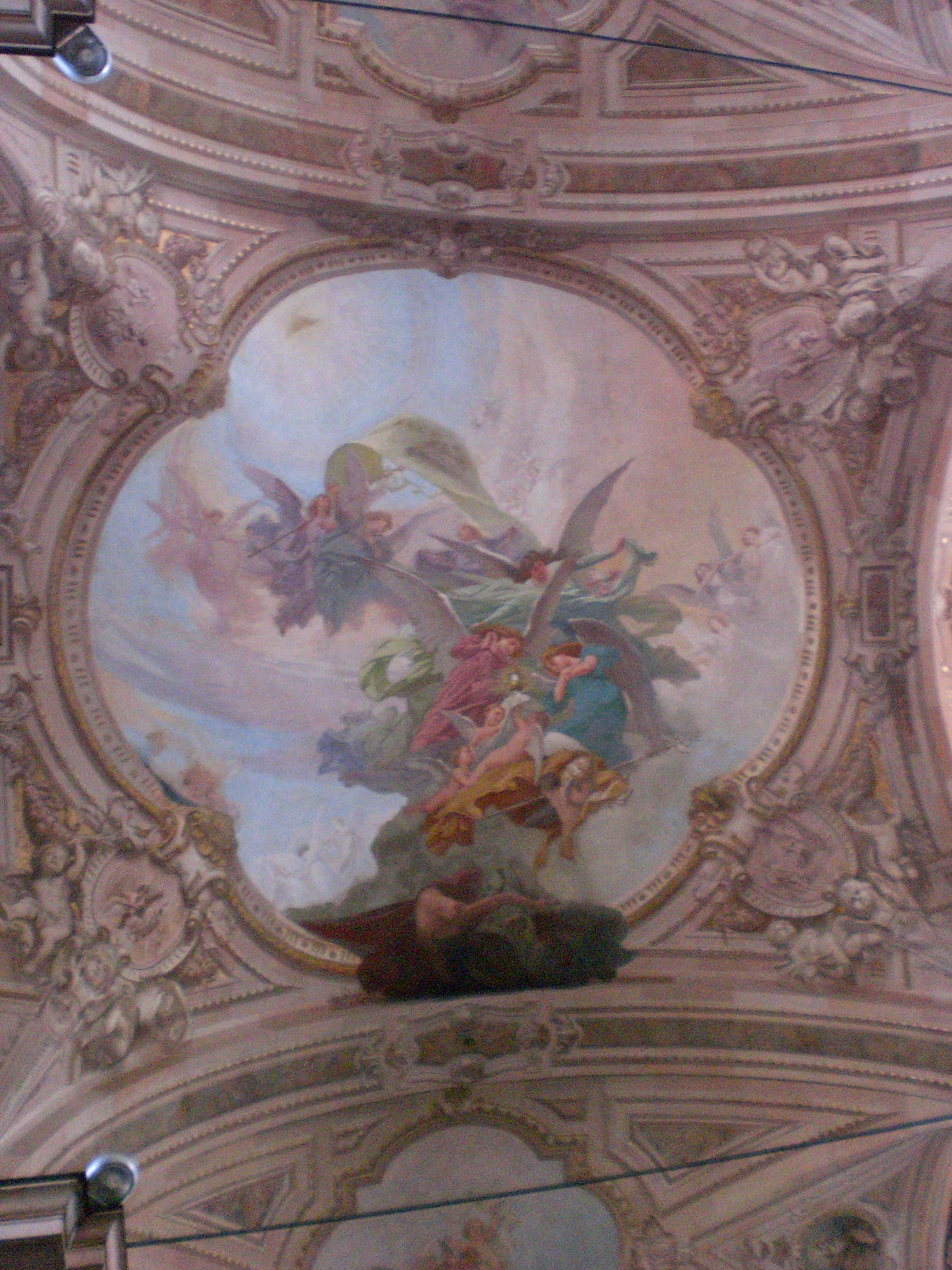 Particolare degli affreschi sulla vota della basilica di San Giovanni Battista a Busto Arsizio (VA).